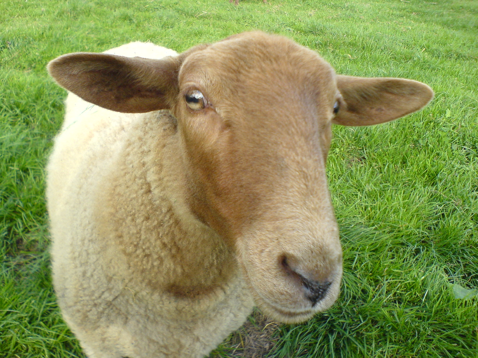 Un mouton photographié en Allemagne